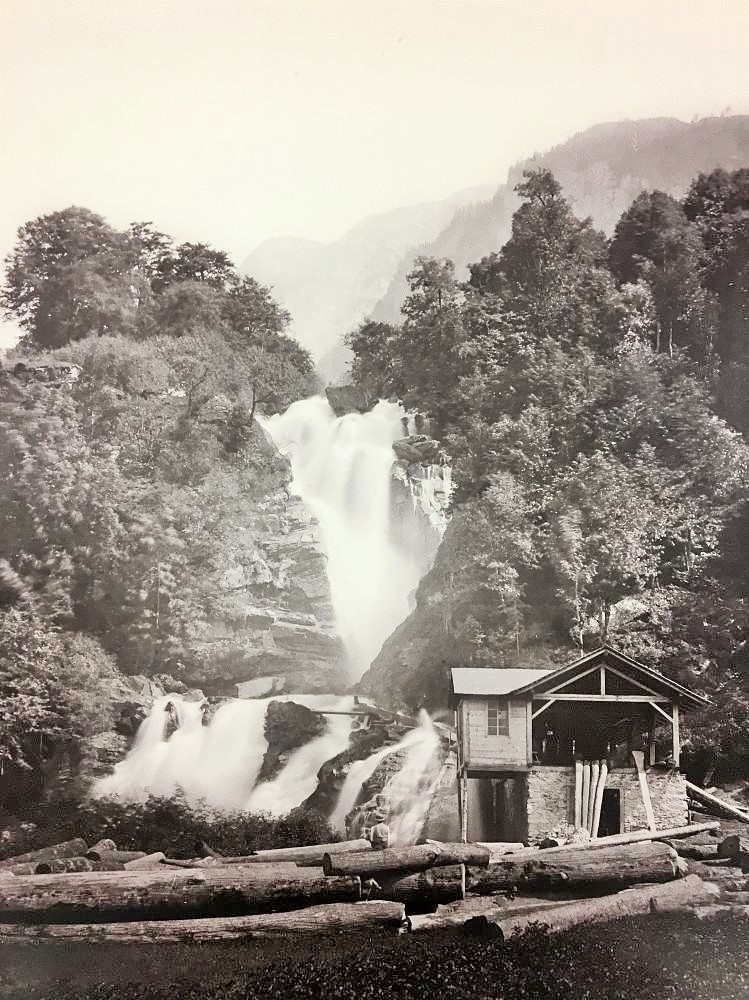 Charles Soulier 1865 unterer Reichenbachfall BE, Schweiz: Sägemühle am unteren Reichenbachfall